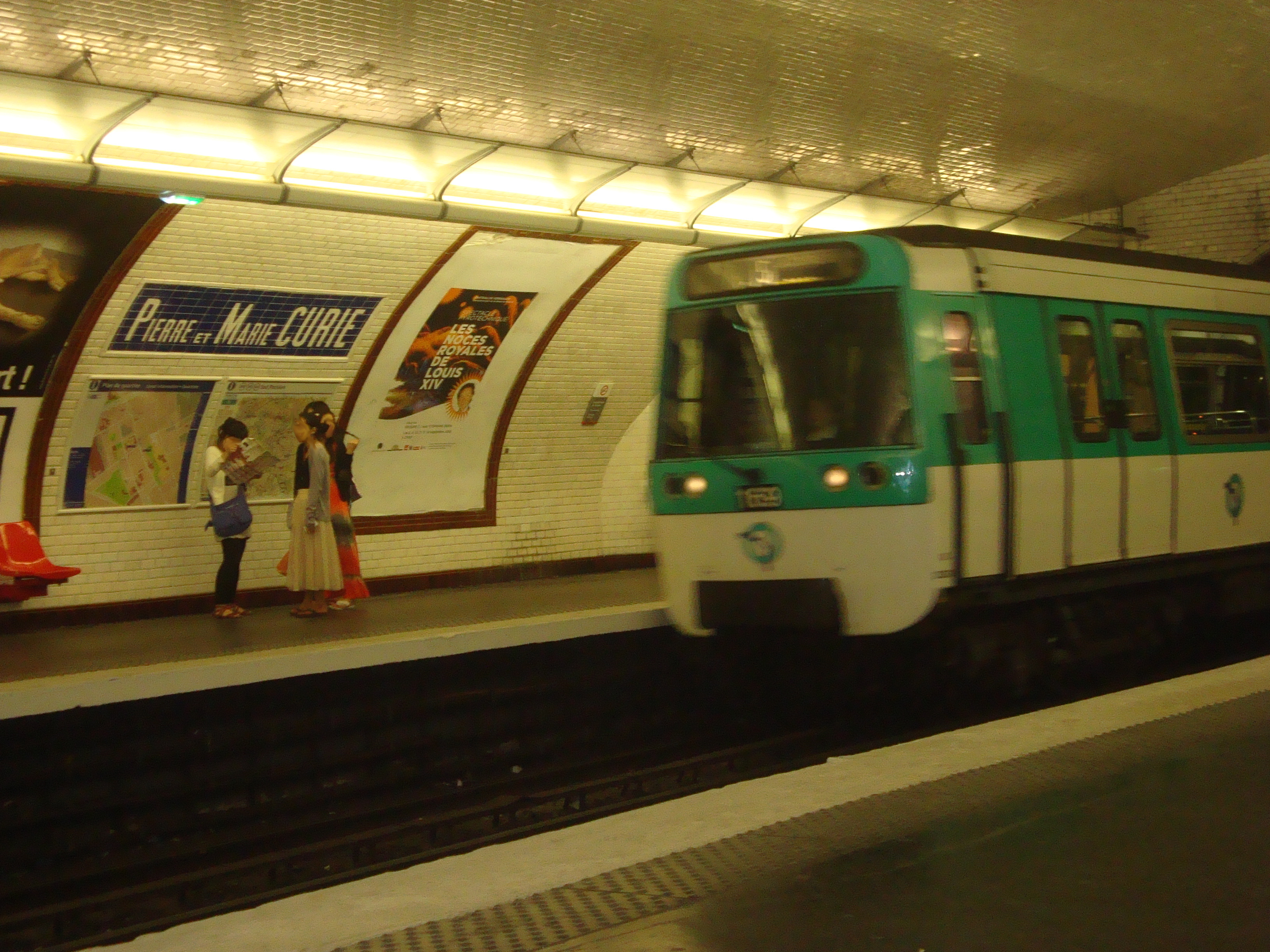 Quais de la station Pierre et Marie Curie sur la ligne 7 du métro de Paris